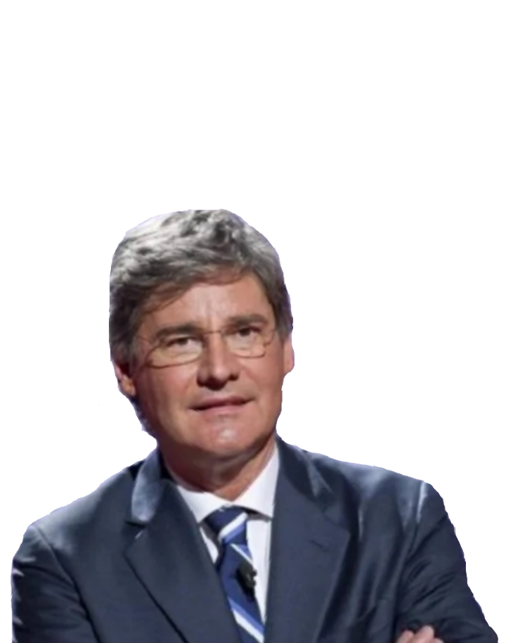 Immagine con Paolo del debbio scontornata